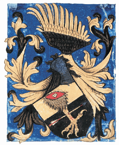 Kölkedy János, Máté, András, Péter címere